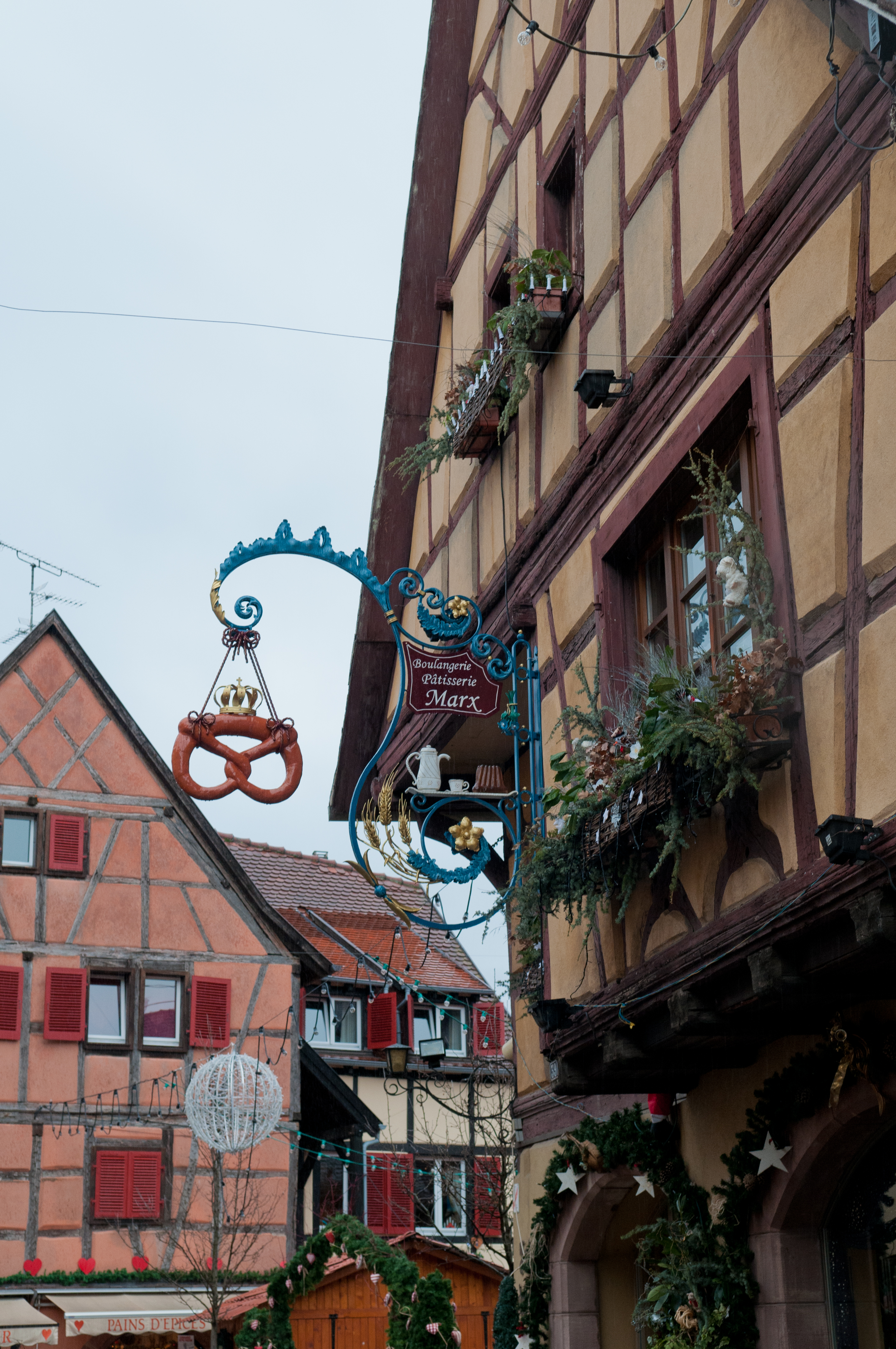 Eguisheim, Alsace